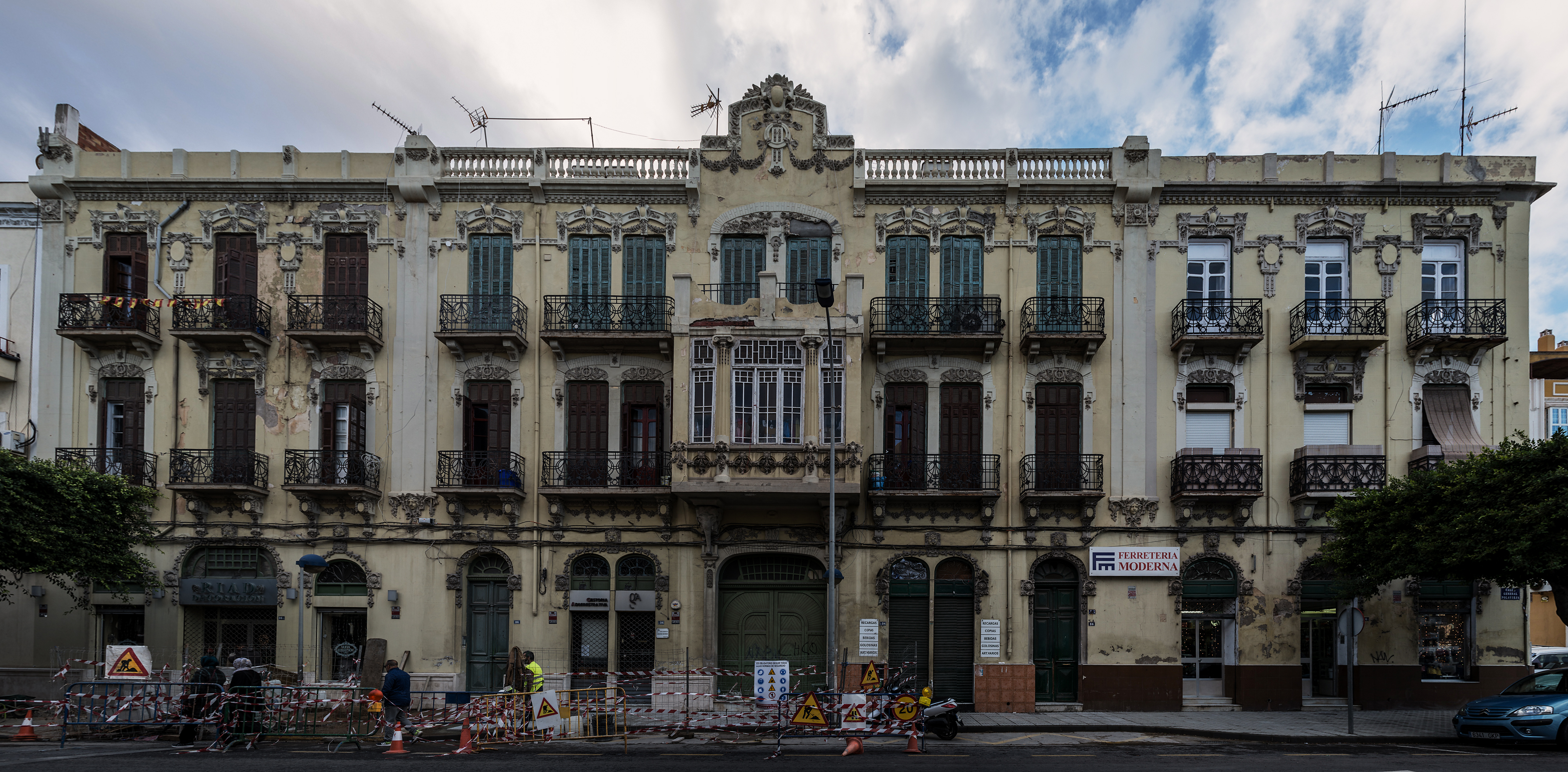 La Casa de las Fieras es un edificio modernista de la ciudad española de Melilla, situado en la calle General Polavieja, que forma parte del Conjunto Histórico Artístico de la Ciudad de Melilla, un Bien de Interés Cultural.